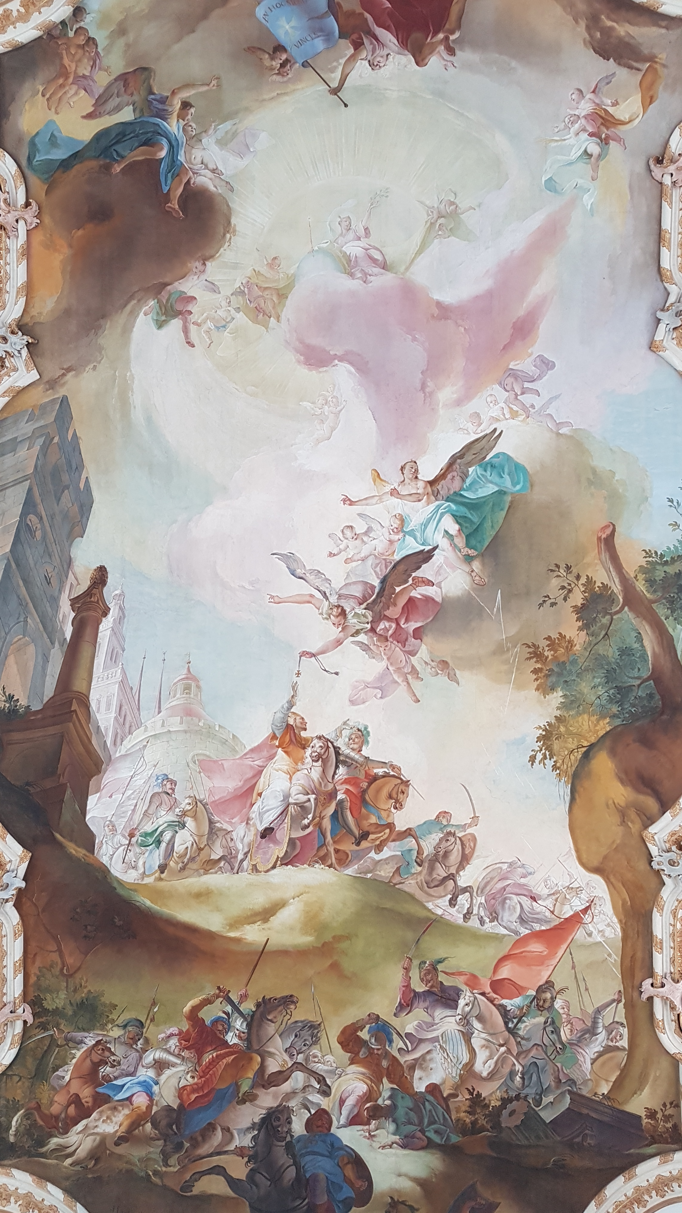 St. Ulrich (Eresing), das gewaltige Hauptfresko am Langhausgewölbe